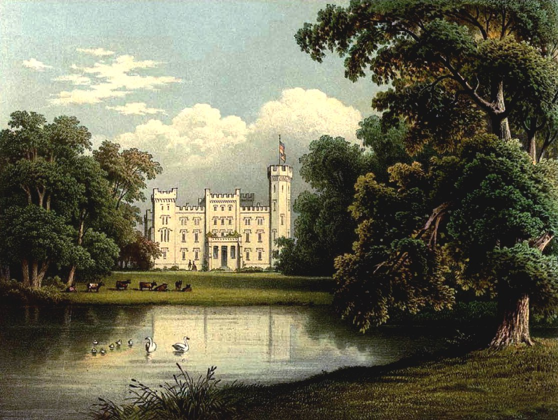 Schloss Wartenberg, Lithografie aus dem 19. Jahrhundert